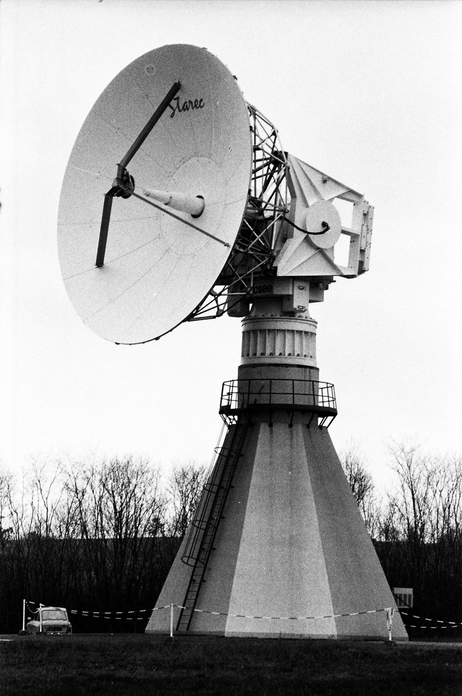 Site du CNES (Centre National d'Etudes Spatiales). 11 mars 1985. Vue d'ensemble de l'Antenne 8GH2. Cliché pris le jour où le satellite Spot 1 subit toutes une série de tests aux vibrations (visite des locaux et installations). Observation: Satellite Spot 1 : plus gros satellite européen construit pour observer la Terre (images à haute résolution). Maîtrise d'oeuvre CNES. Intégration par Matra. Alcatel-Thomson Toulouse a fourni des équipements. Projet né en 1975 au CNES ; phase de réalisation a commencé en juin 1980. Mise en orbite prévue en octobre 1985 par Ariane 1. Création en parallèle de la société "Spot-Images" chargée de prospecter et de commercialiser le produit à l'échelle mondiale.